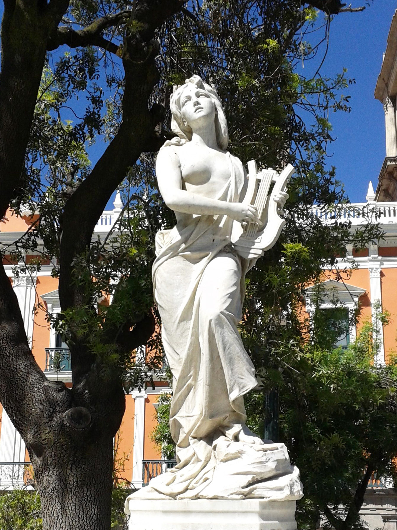 Musa de la música This medium shows the protected monument with the number L/00-263 in Bolivia.